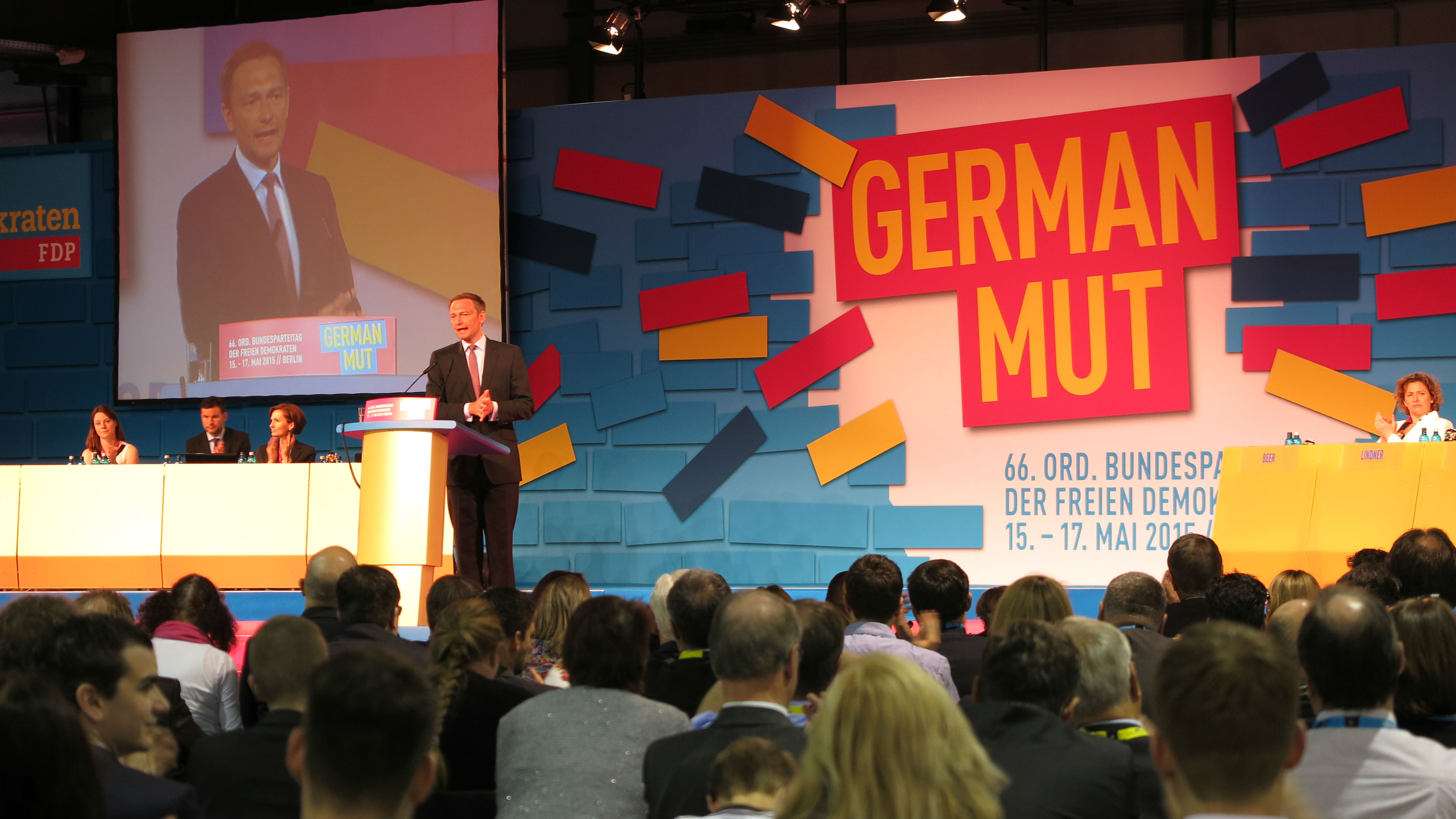 Bühne des 66. Bundesparteitag der FDP